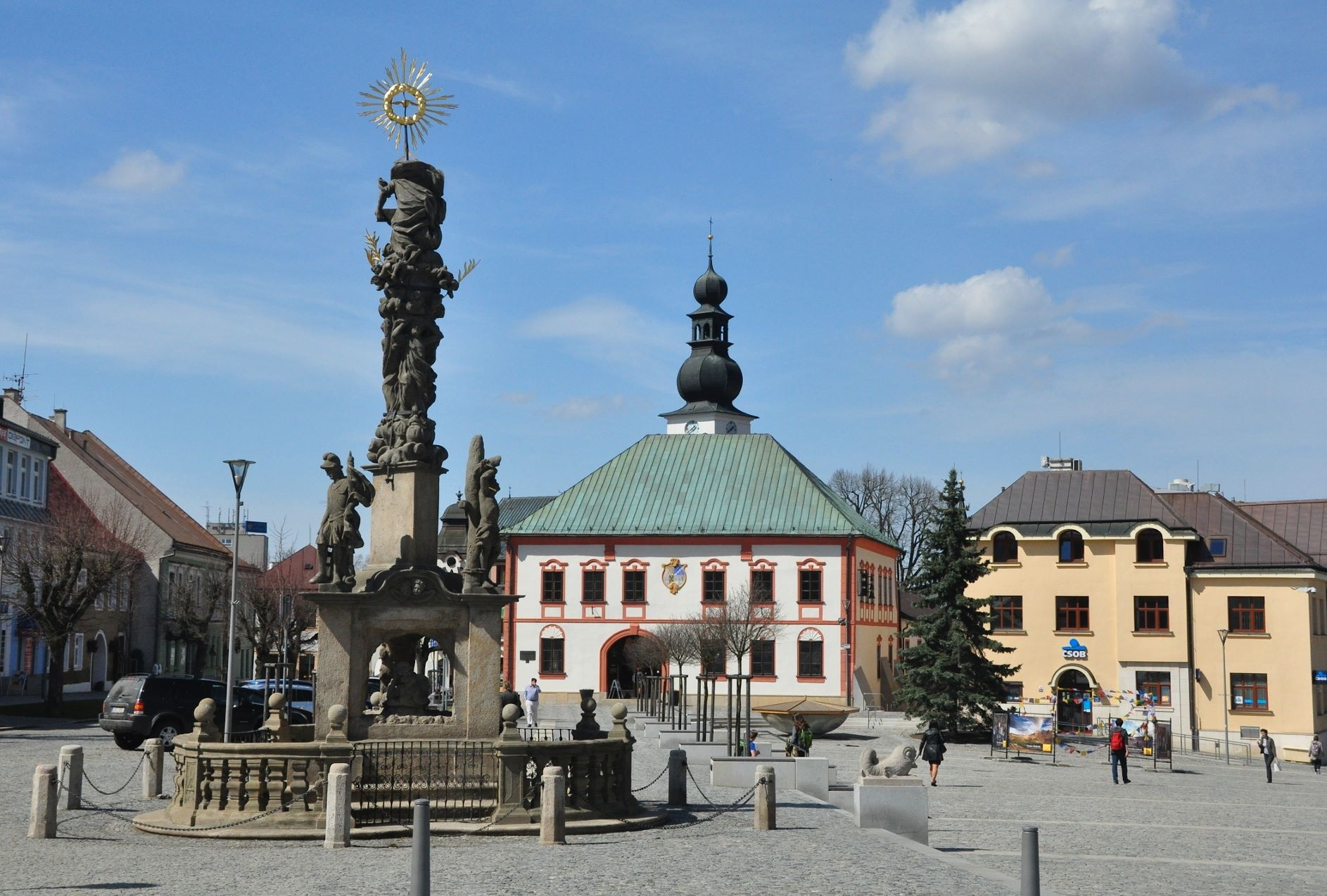 Žďár nad Sázavou (Saar), Hauptplatz mit Pestsäule und Rathaus